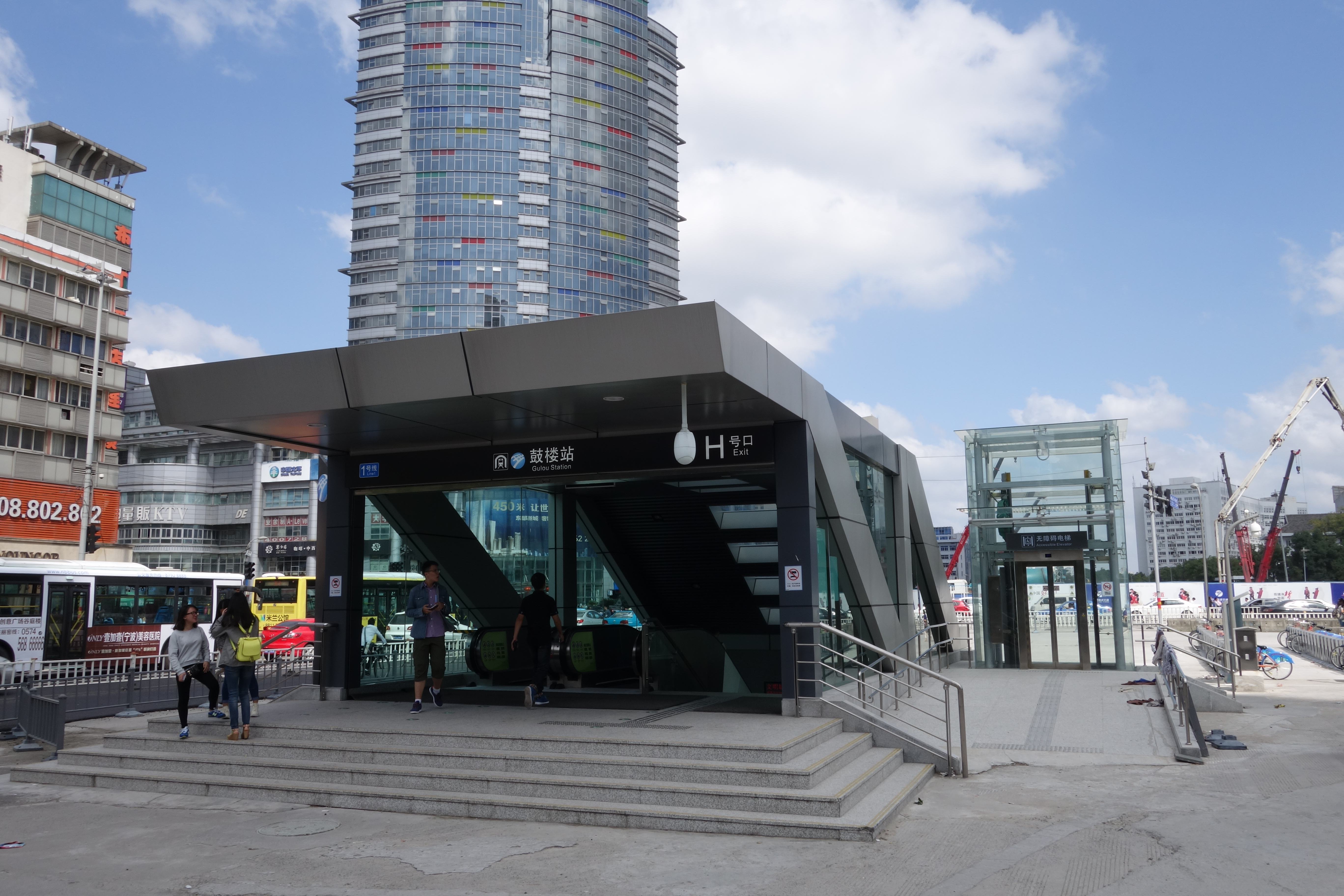 鼓楼站H口